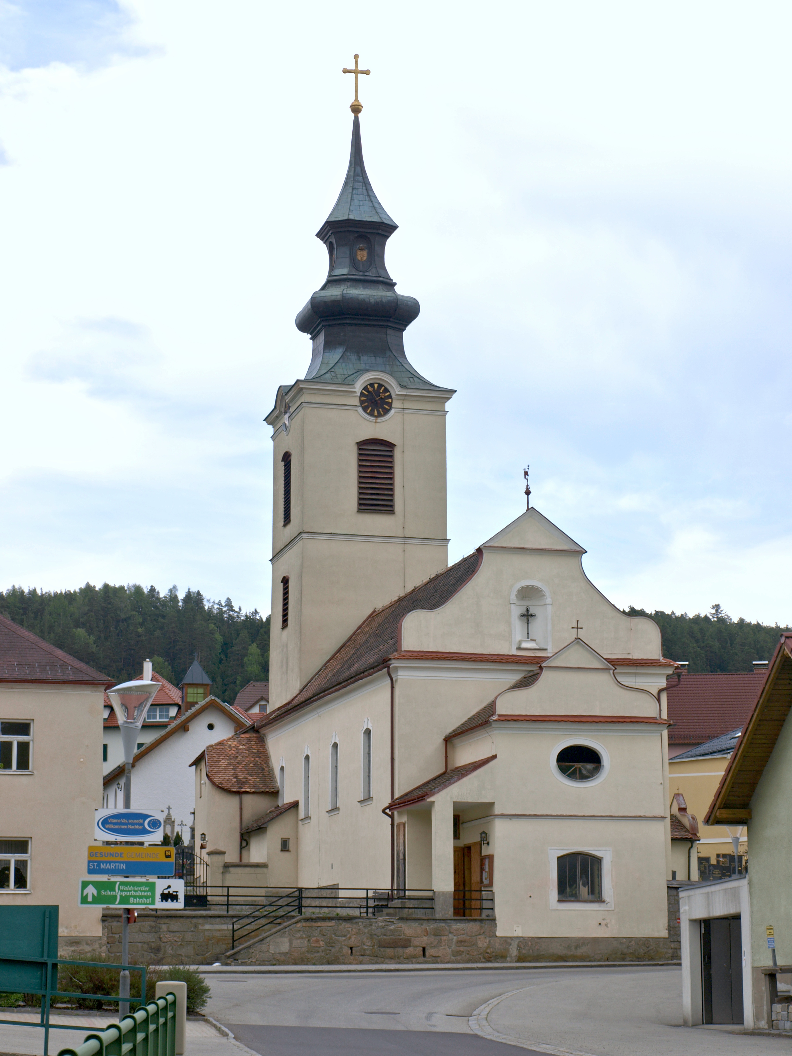 Kath. Pfarrkirche hl. Martin